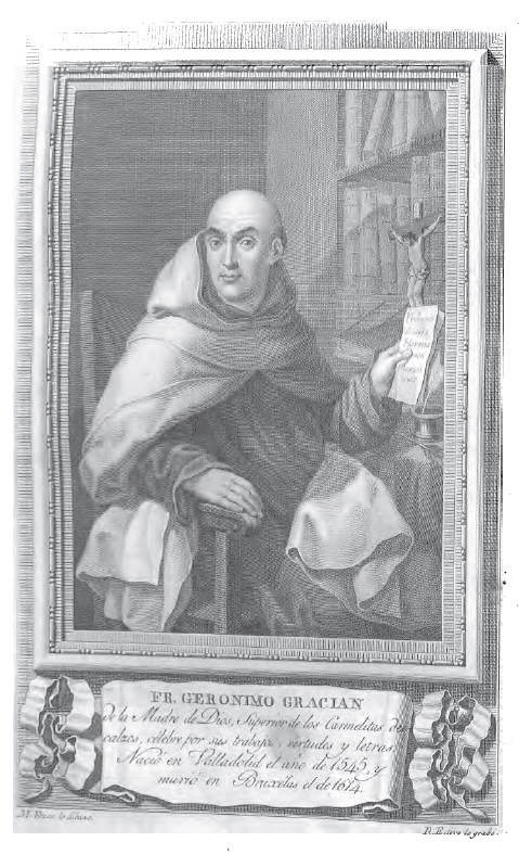 Retrato de Gerónimo Gracián.